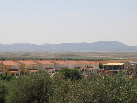 Entorno de Camuñas